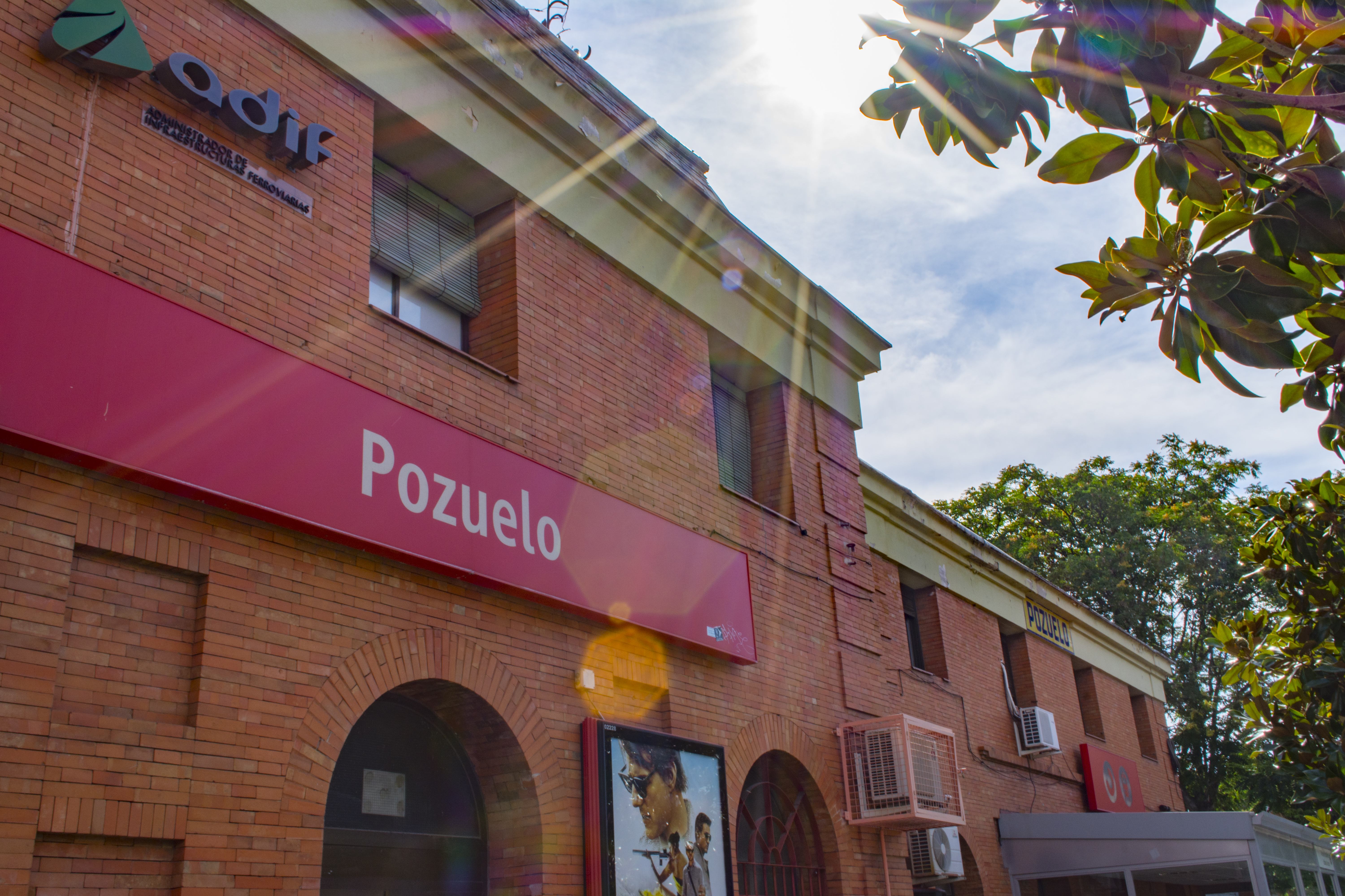 Cartel en la fachada del antiguo acceso de la estación de Pozuelo, hoy sustituido por una estructura contigua y adosada al mismo (Pozuelo de Alarcón, Comunidad de Madrid).